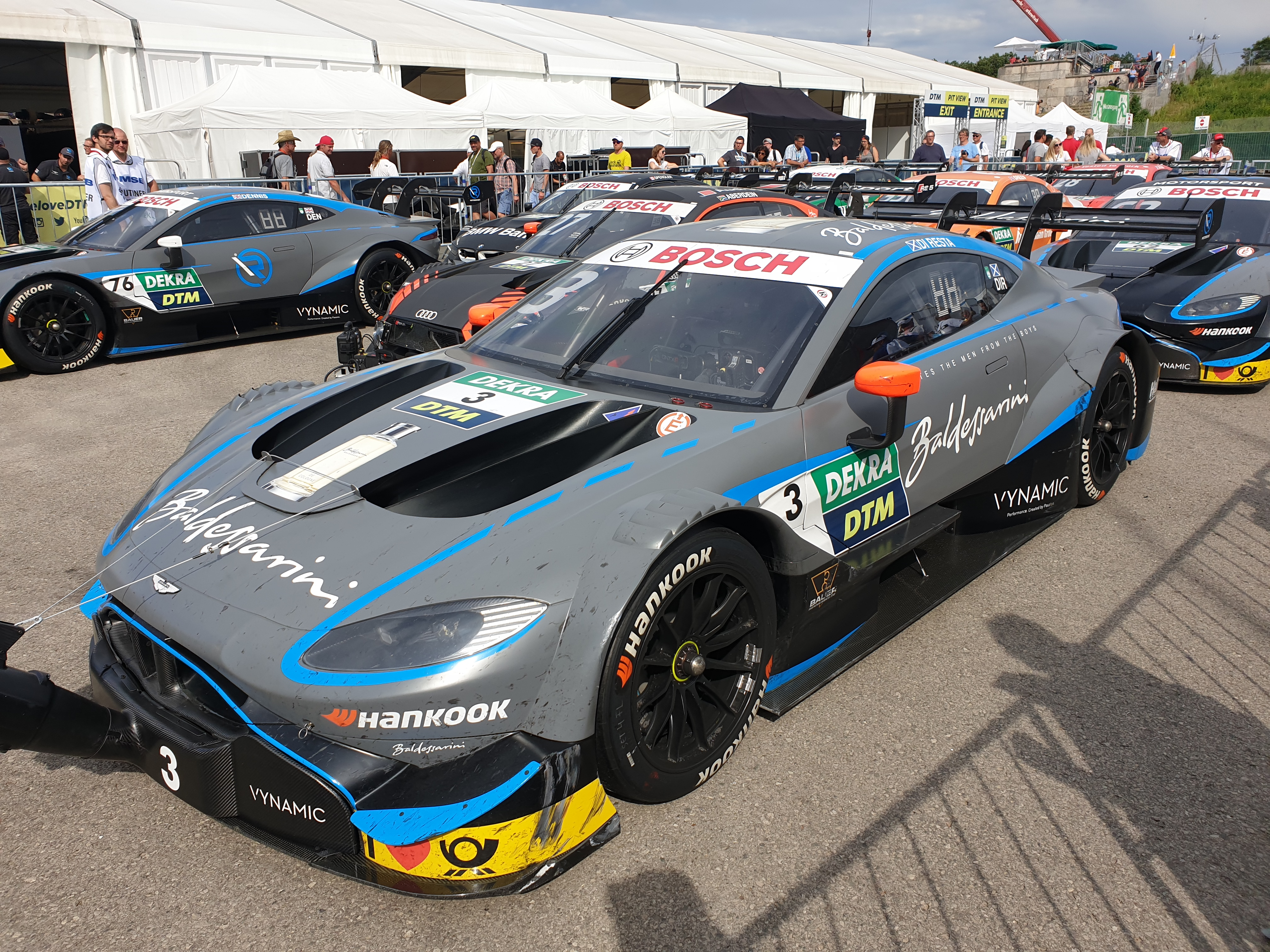 Aston Martin Vantage DTM 2019 am Norisring nach einem Rennen